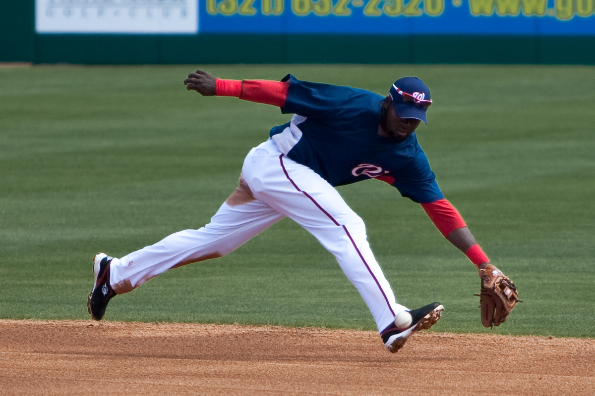 Joel Guzmán